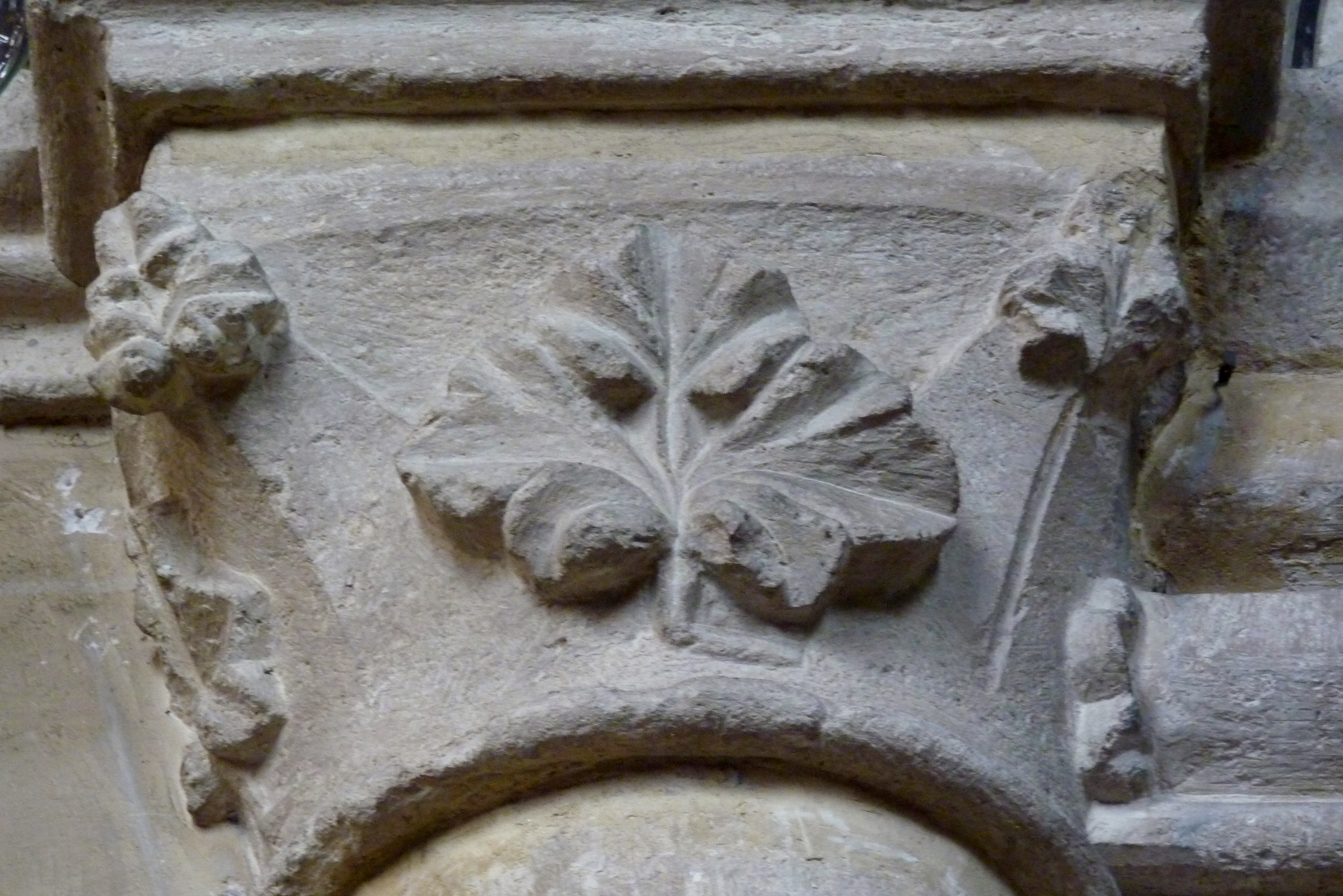 Katholische Pfarrkirche Saint-Germain-d'Auxerre in Dourdan im Département Essonne (Île-de-France), Kapitell